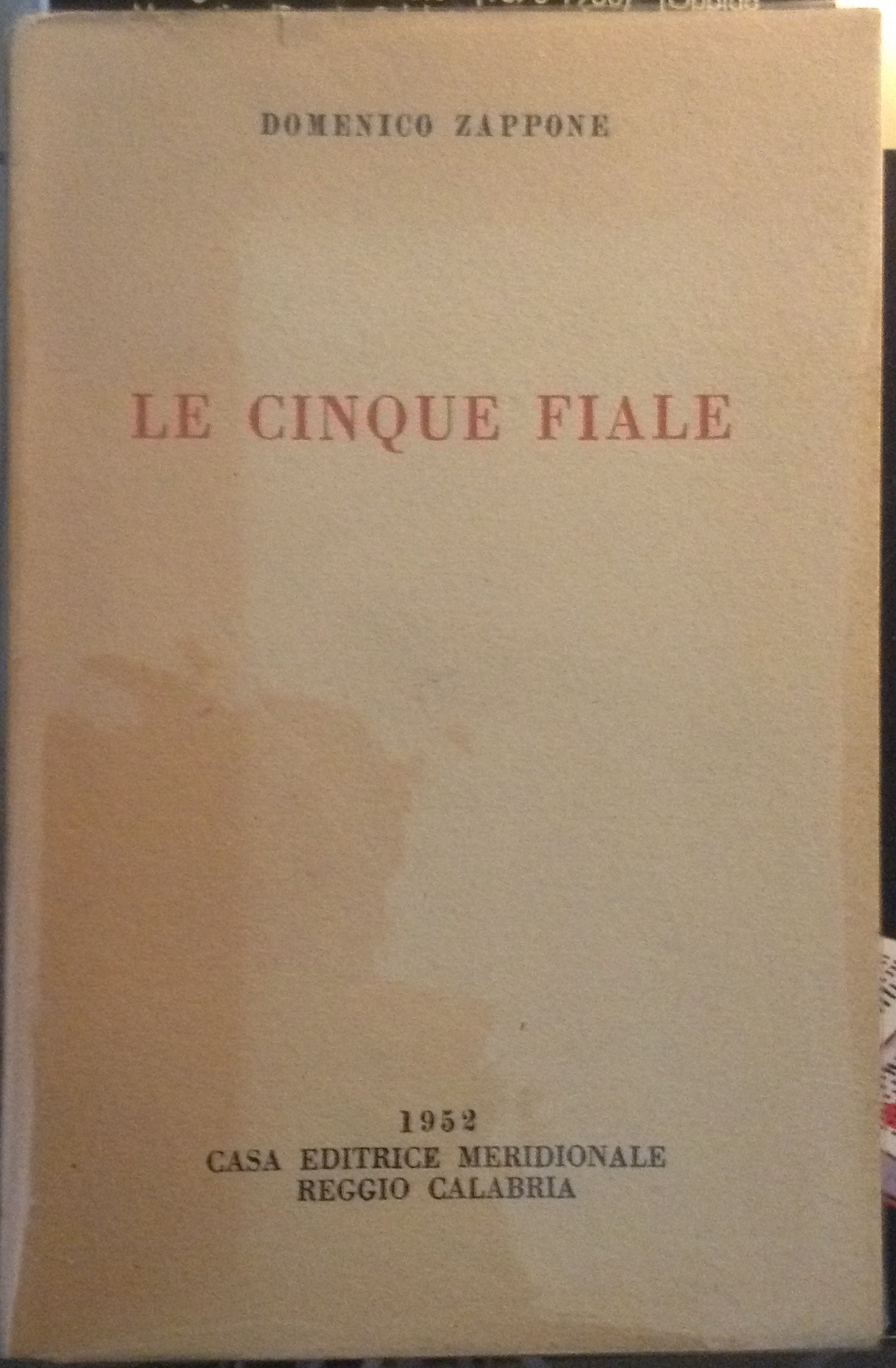 Copertina libro di Domenico Zappone del 1952